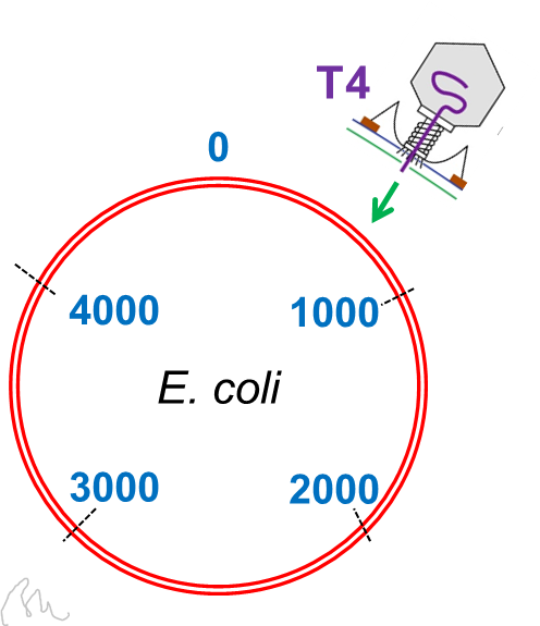 Nếu mô tả bằng vị trí tính theo số cặp ba-zơ ni-tơ (bp) trên chiều dài của nhiễm sắc thể vòng của E. coli, thì thực khuẩn thể T4 thường xâm nhập vào lô-cut 650 kb.